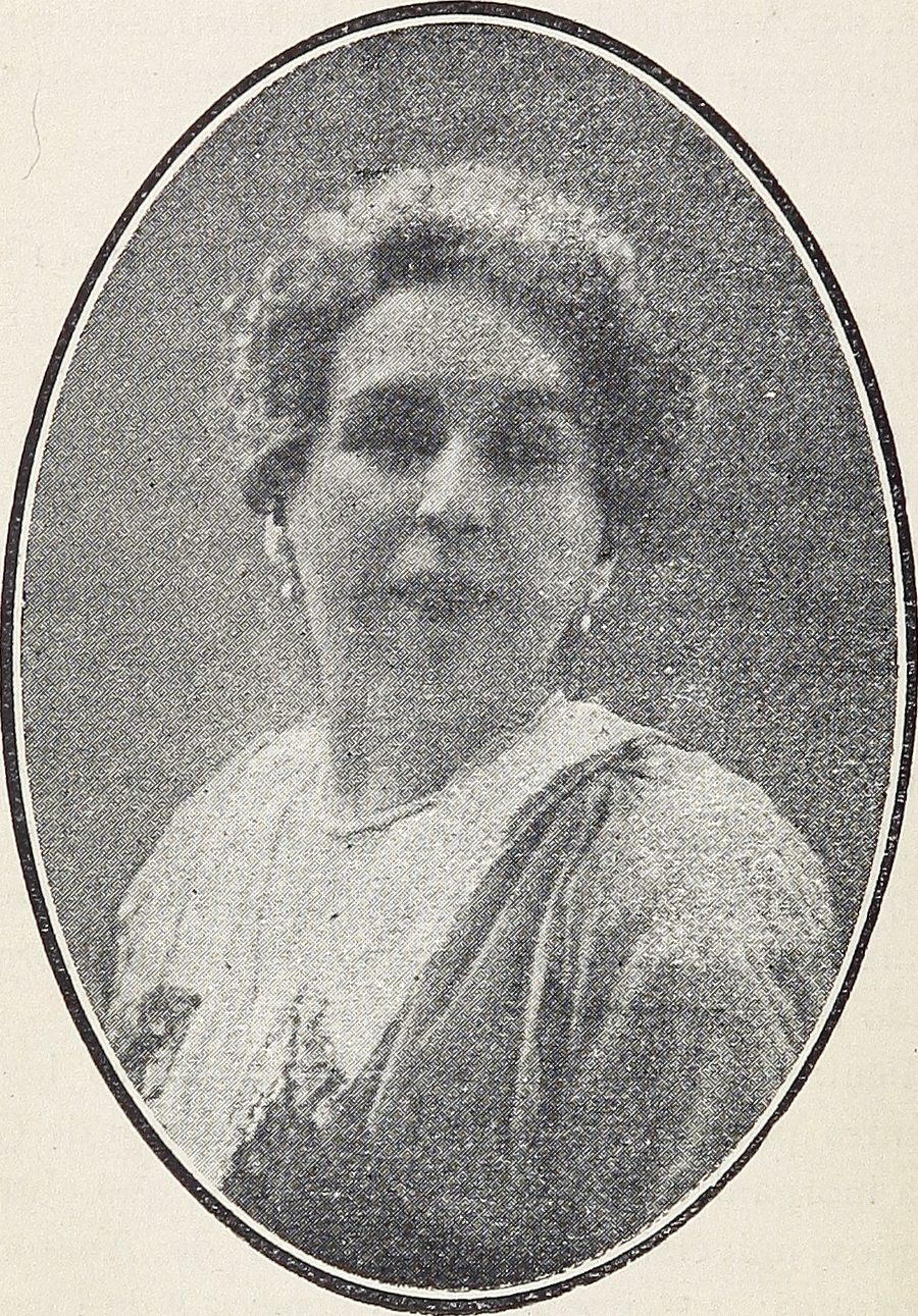 Ernestina Pérez Barahona (Valparaíso, 8 de agosto de 1865 - 1951) fue una médica y activista feminista chilena conocida por ser una de las primeras mujeres estudiantes de medicina de la Universidad de Chile y la segunda médica de América Latina tras titularse días después que Eloísa Díaz Insunza, también chilena. En Mujeres chilenas de letras / Luisa Zanelli López. Santiago : Imprenta Universitaria, 1917. 203 páginas